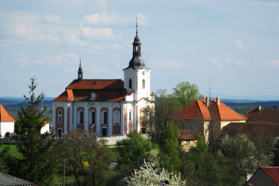 Kostel sv. Jakuba Většího (Sedlice), Sedlice